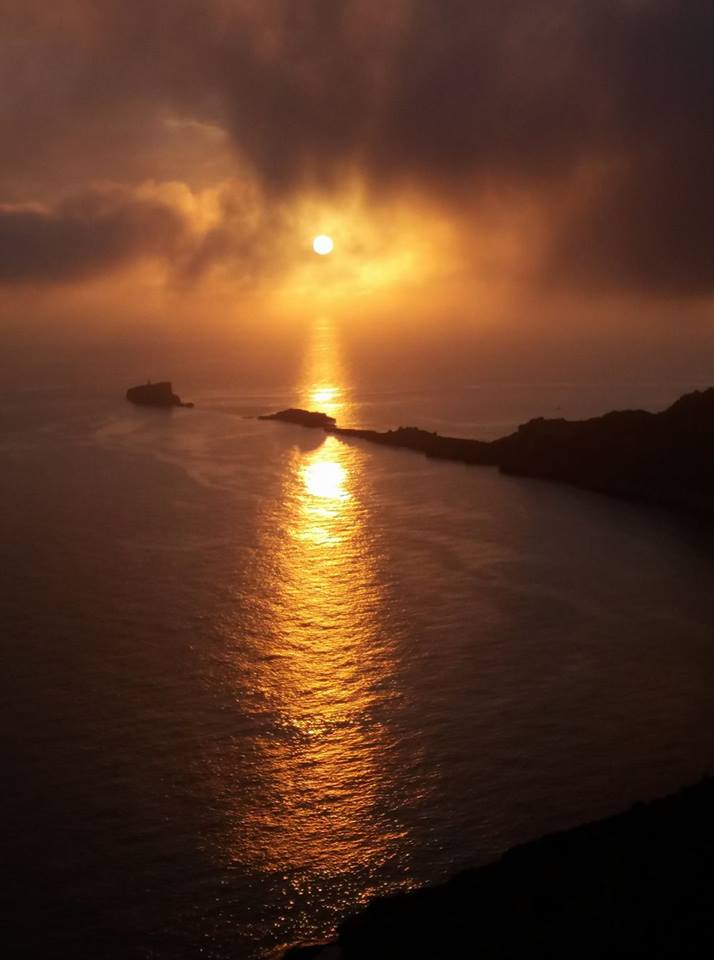 Atardecer desde el Cabo de Cala Figuera, en el municipio español de Calviá, Mallorca.